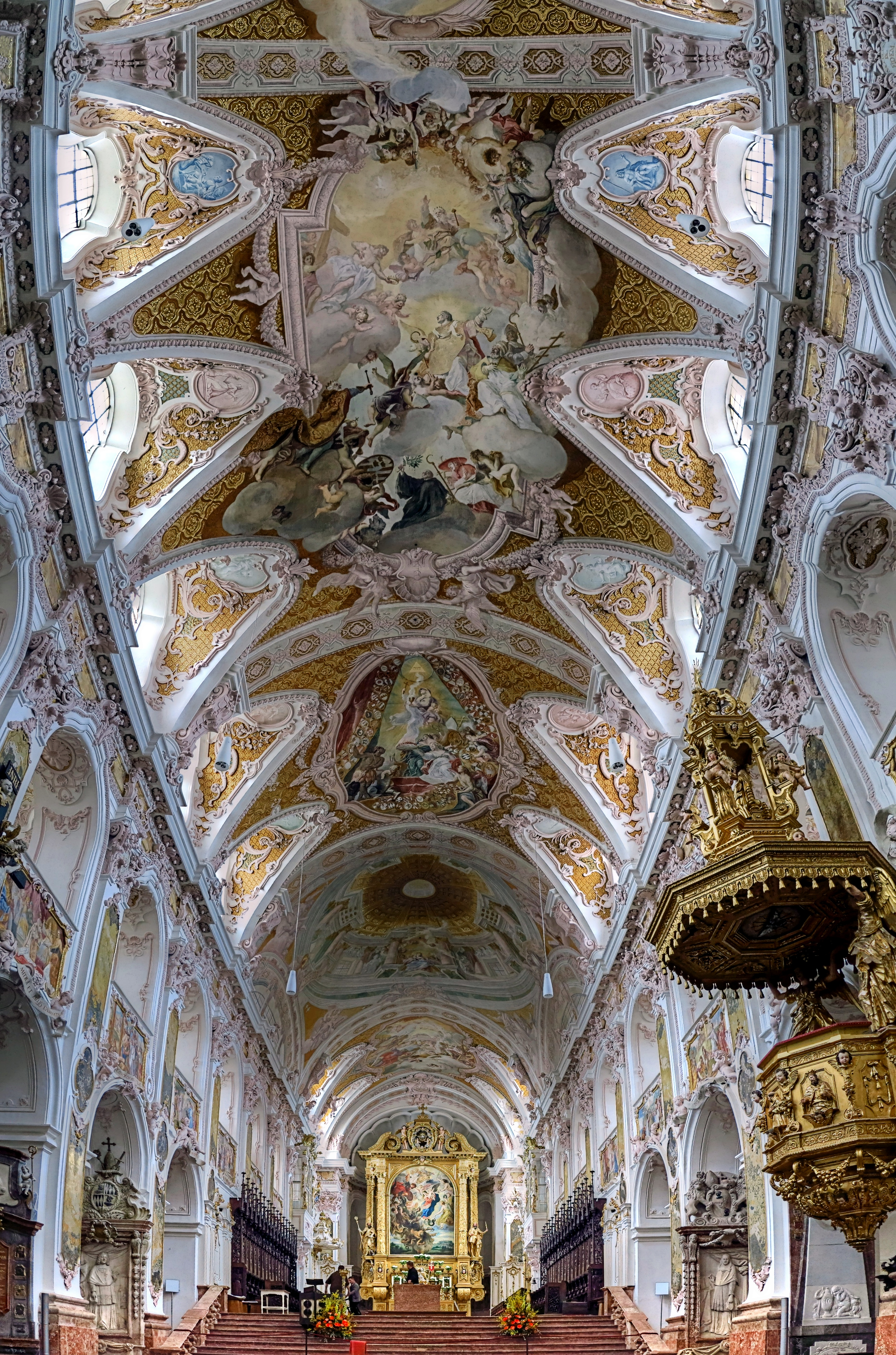 Deutschland, Bayern, Freising, Freisinger Dom St. Maria und St. Korbinian, Hauptaltar (mitte), Kanzel (rechts) und Deckenfresken